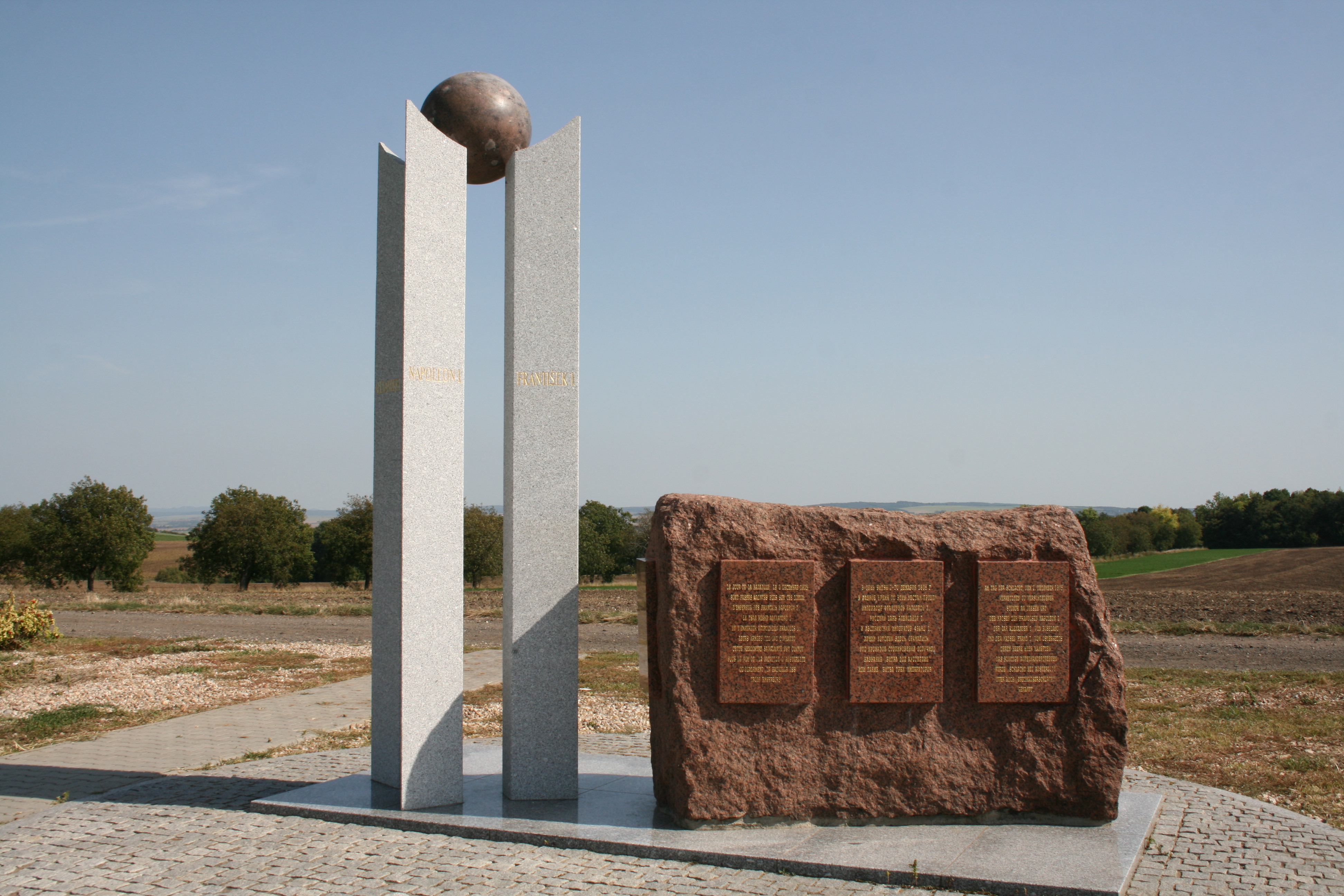 Pomník Tří císařů na návrší nad obcí Zbýšov, okres Vyškov, nedaleko silnice do Blažovic. Celkový pohled od severu.